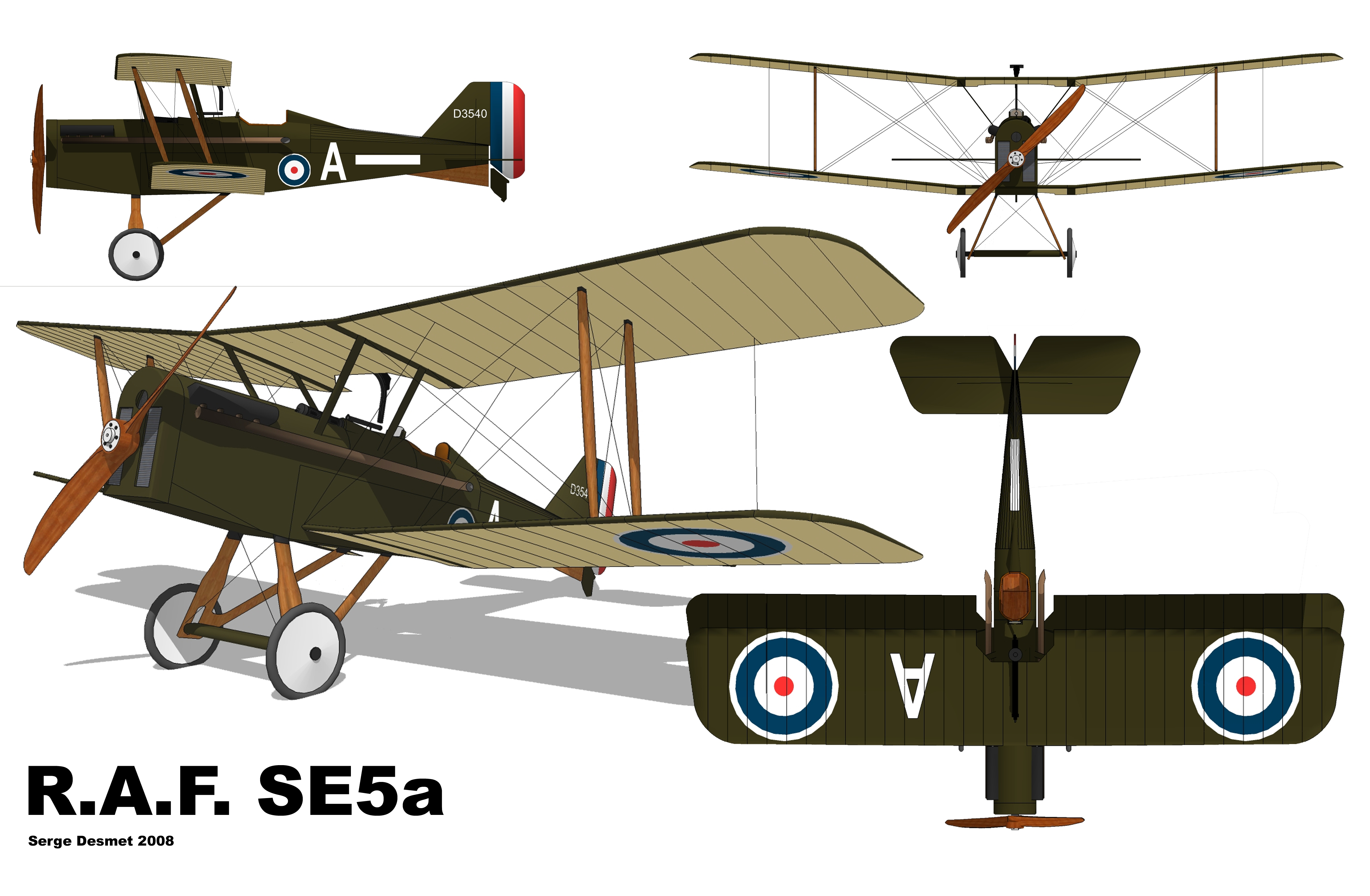 Plan 3 vues du Royal Aircraft Factory S.E.5a